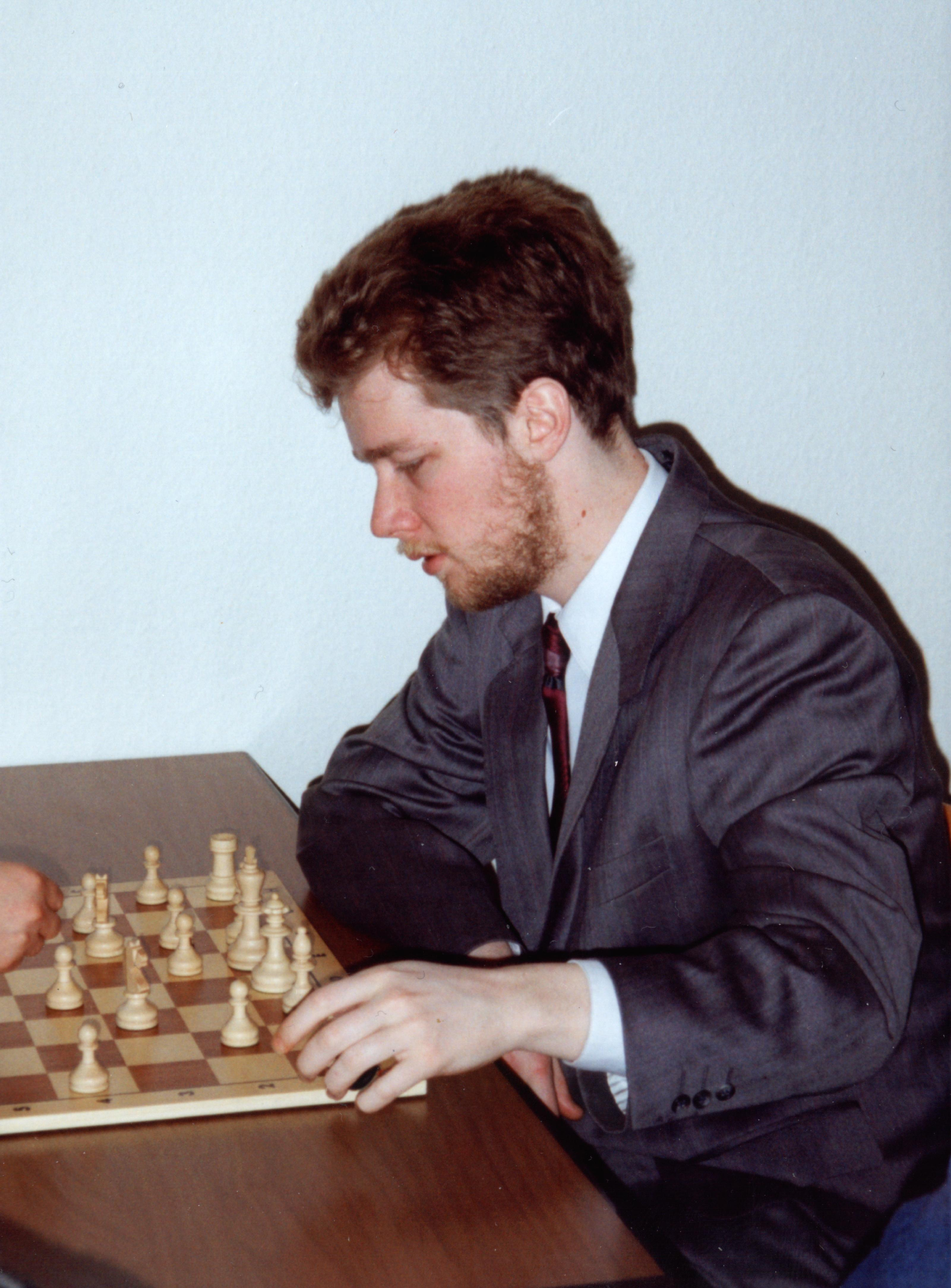 Alexander Walerjewitsch Chalifman, 1999 bis 2000 Schachweltmeister der FIDE